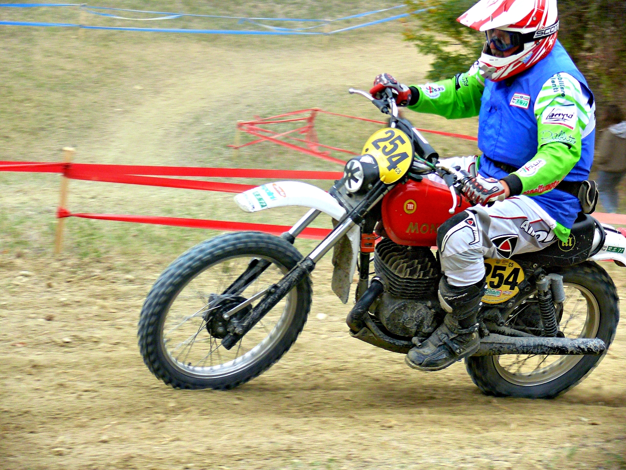 2017 Campionato Italiano Gruppo 5 Regolarità Epoca e Trofeo Testori. 7° Prova - Perino (PC) - Italia.